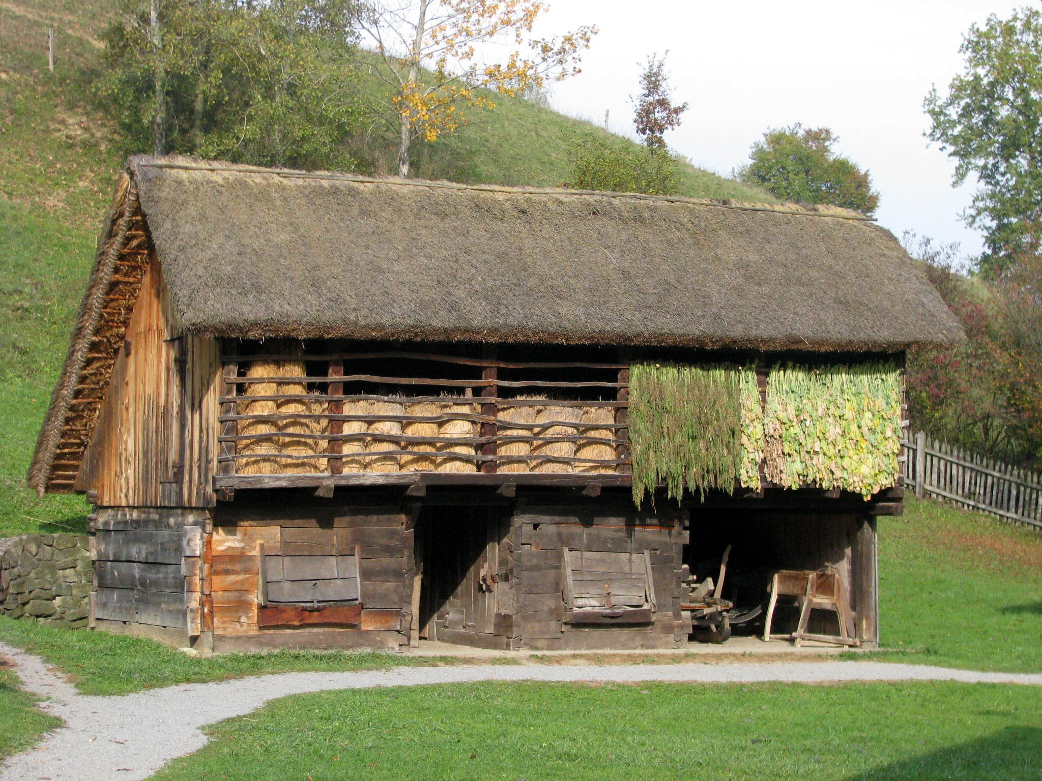 Open air museum, Rogatec, Slovenia